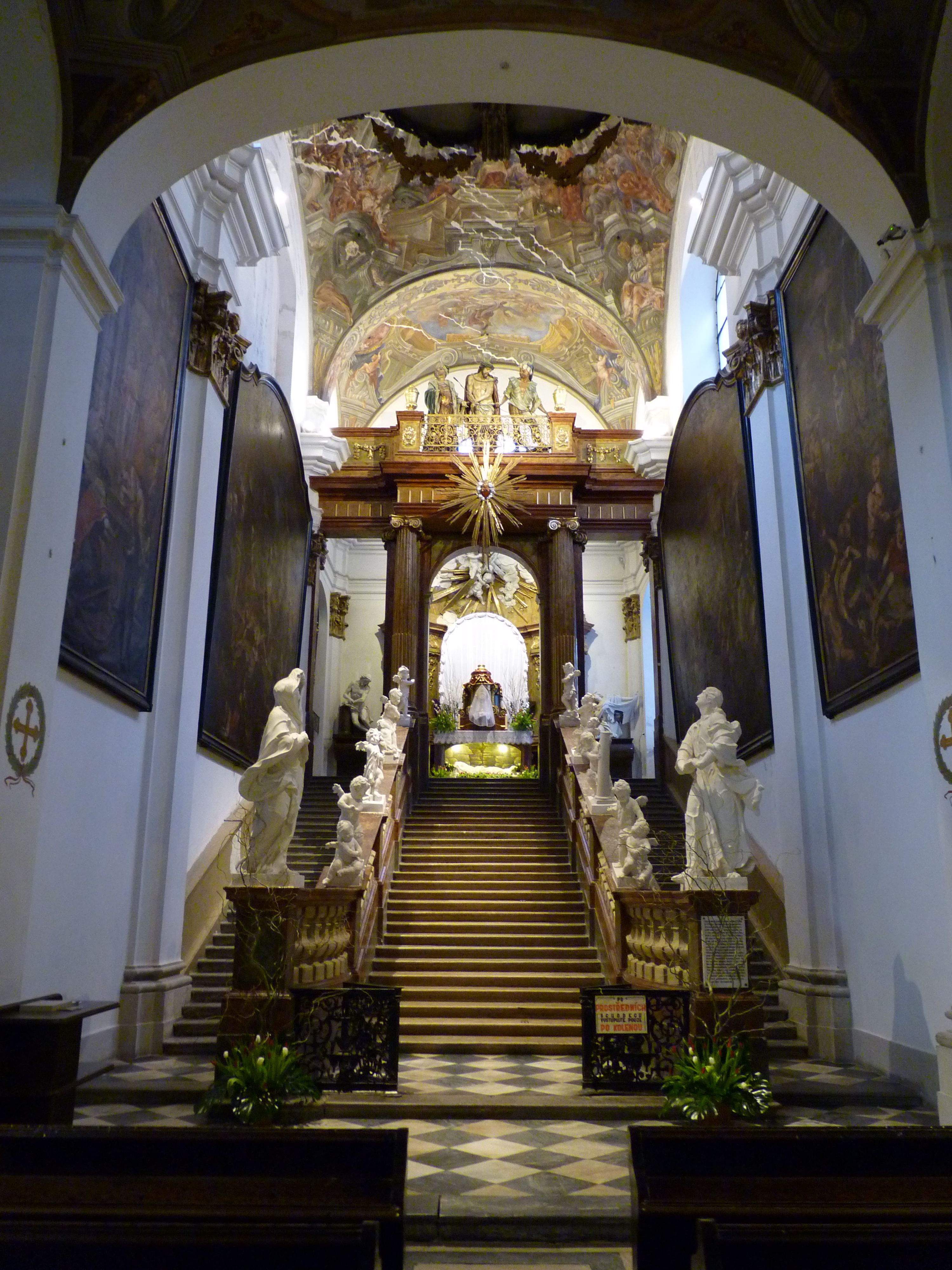 Klášter minoritů, Brno